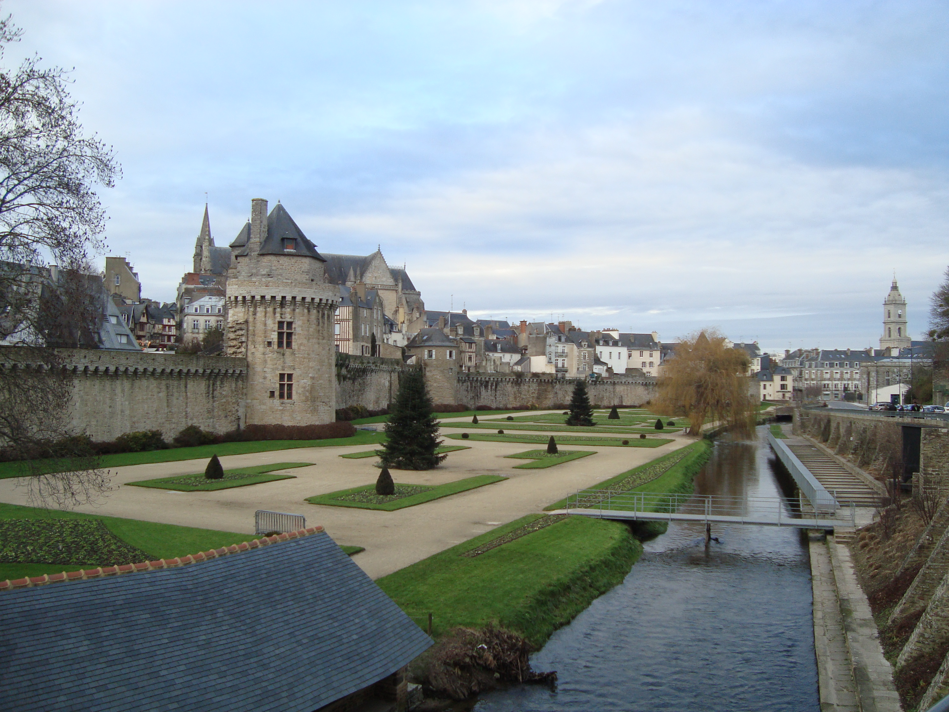 La tour du Connétable et les jardins dans les remparts de Vannes